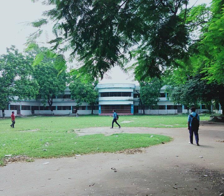 শক্তিগড় বিদ্যাপীঠ স্কুল- ভিউ